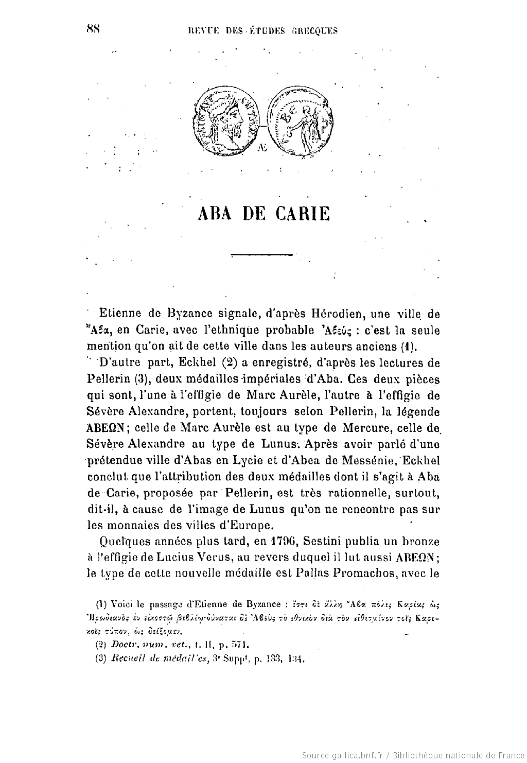 Pierwsza strona artykułu Babelona Aba de Carie z rerodukcjami monet